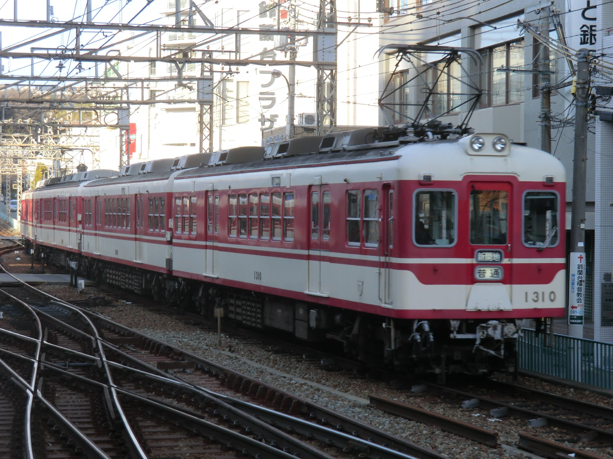 神戸電鉄1000系 デ1300形1310ほか4連 鈴蘭台駅